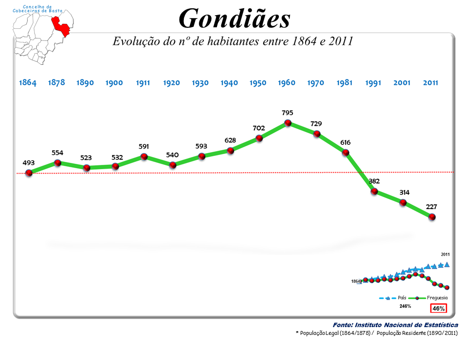 Censos 1864/2011